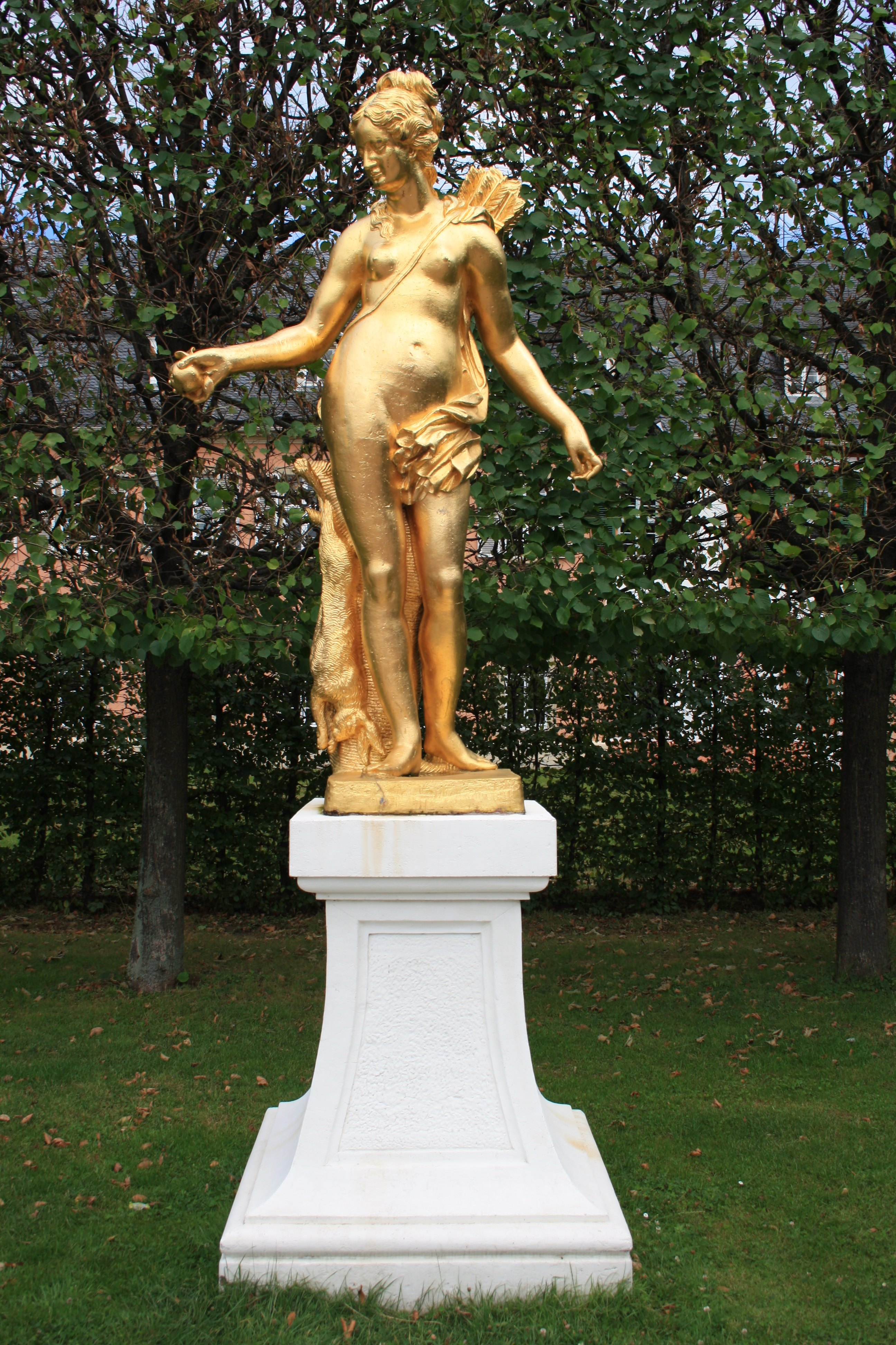 Atalante in Gold (Heinrich Charasky 18. Jhdt.)